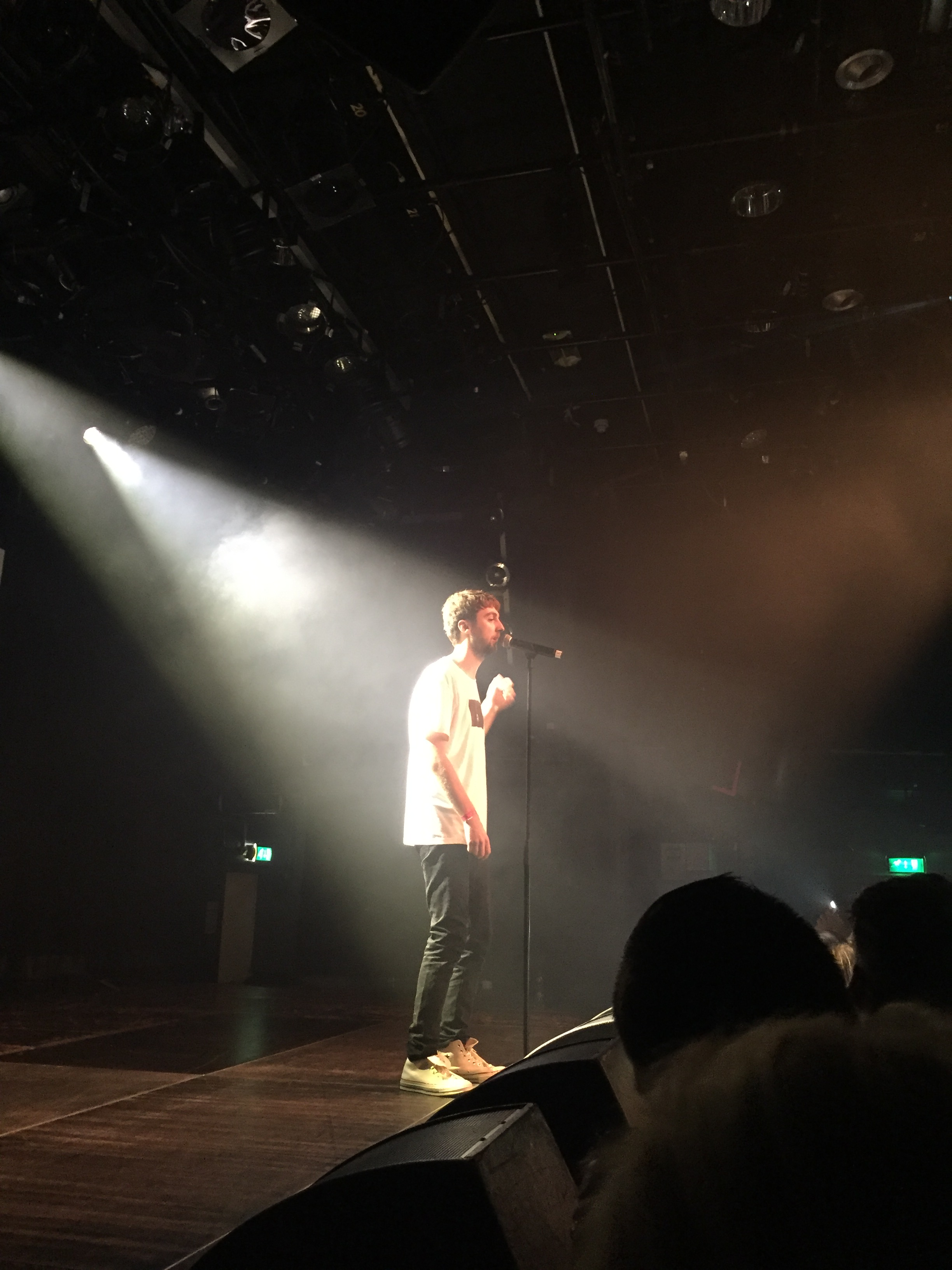 Ares